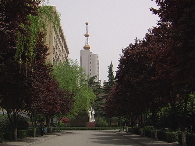 西安邮电学院雁塔校区，2006年4月。